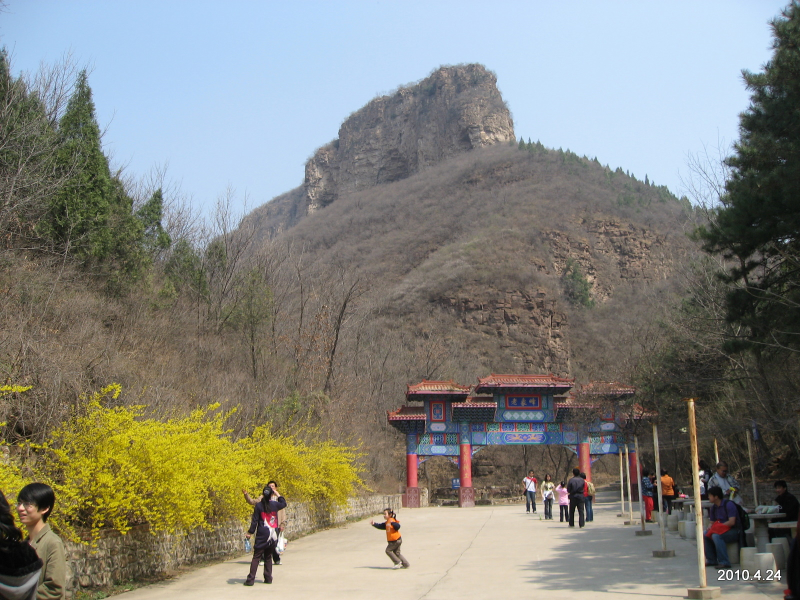 北京平谷老象峰